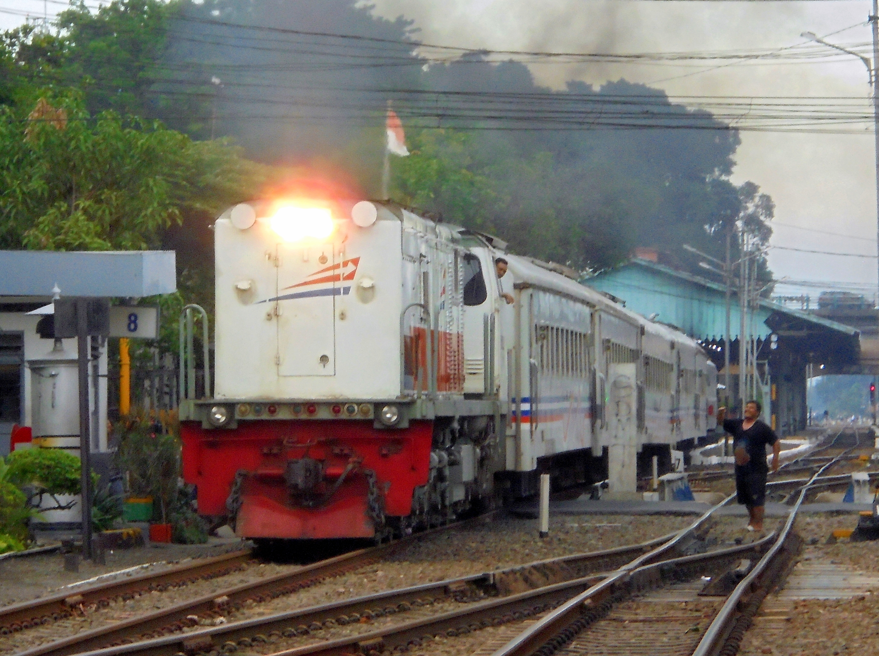 Kereta api lokal Bojonegoro saat meninggalkan Stasiun Surabaya Gubeng